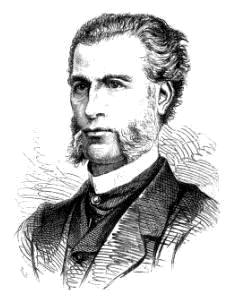 "M(e) Rousse, bâtonnier de l'ordre des avocats" (Aimé Joseph Edmond Rousse).